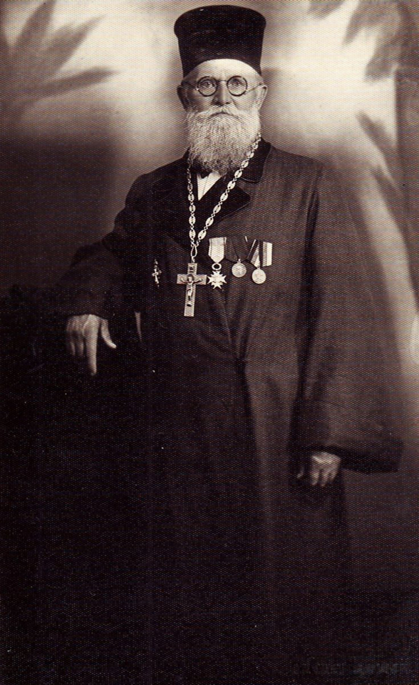 Протоиерей Иаков Карп